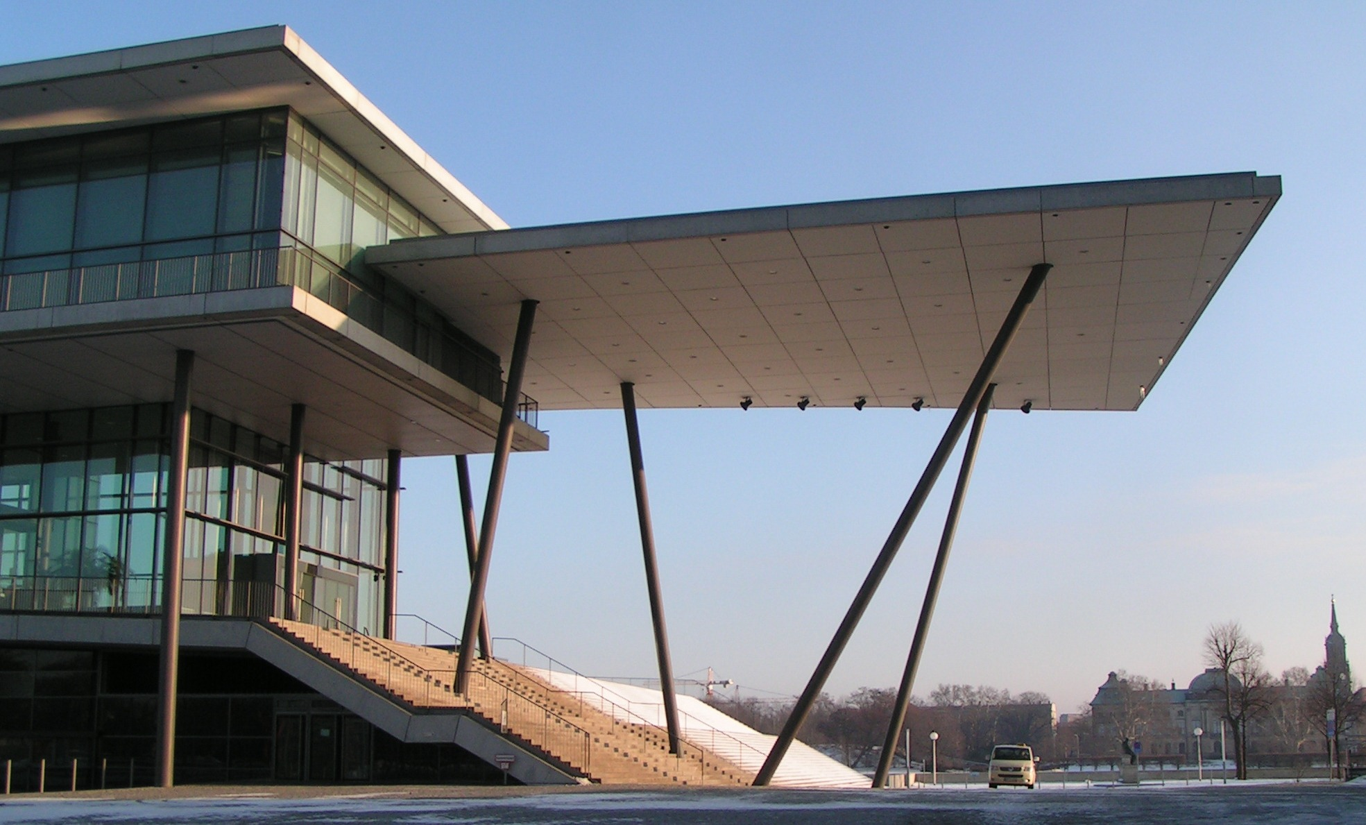 Eingang zum Kongresszentrum Dresden. Im Hintergrund das Japanische Palais und die Dreikönigskirche in Dresden-Neustadt